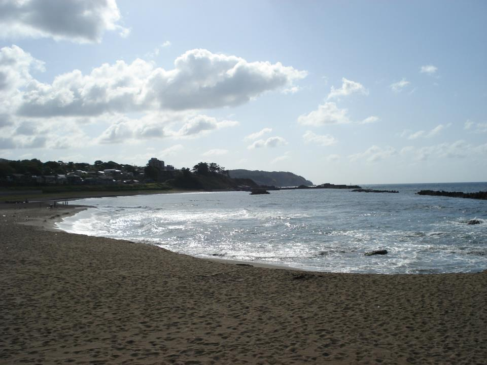 日本の渚百選 鯨波